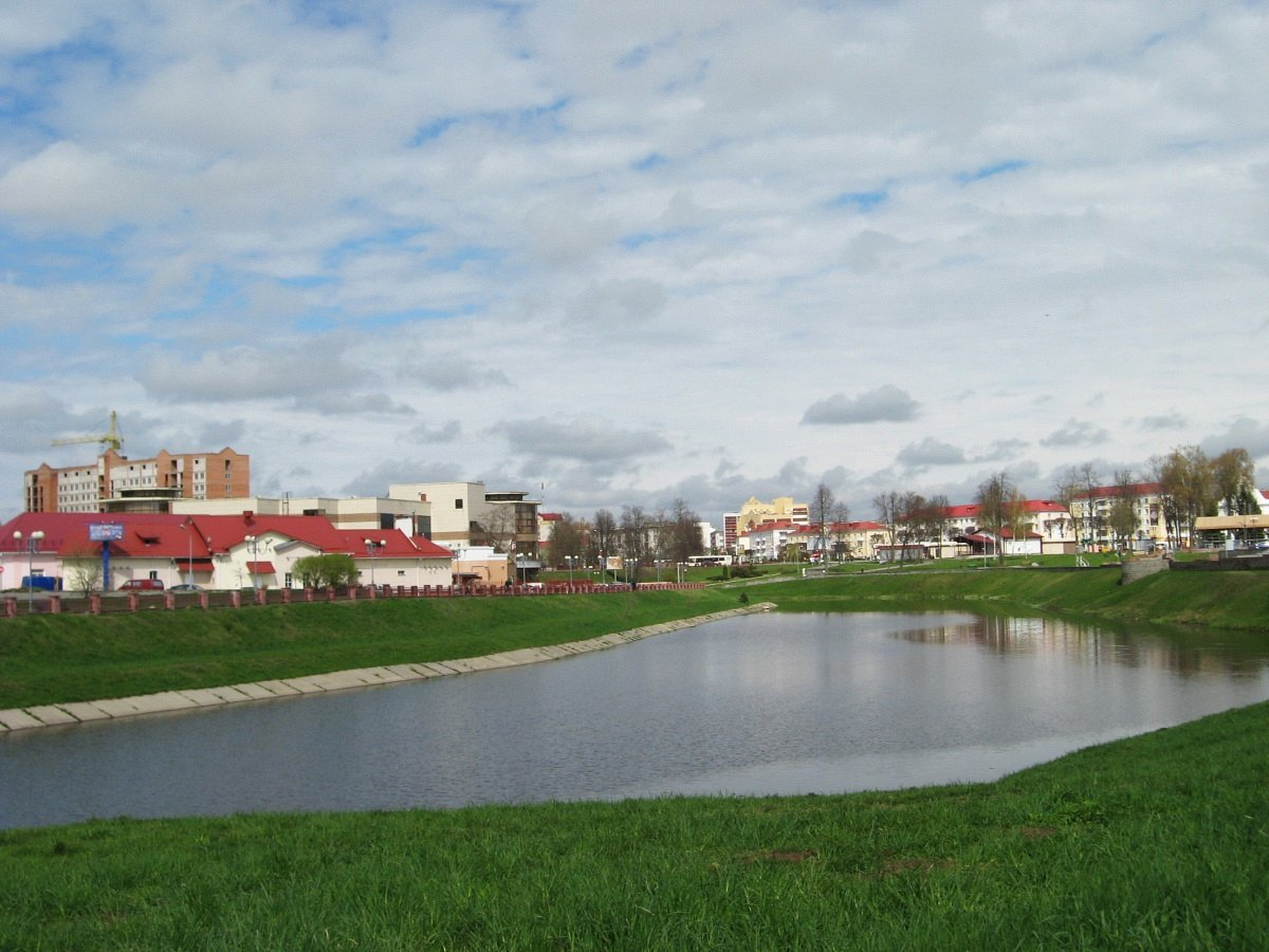 Орша. Краявід з гарадзішча